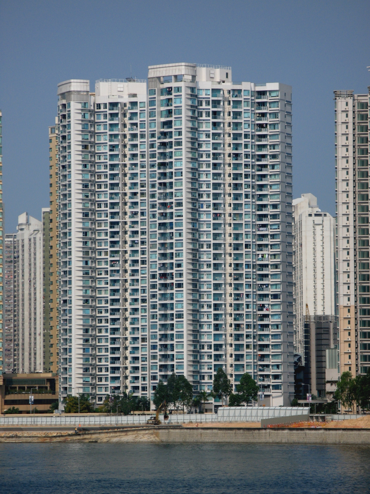 LaCosta 嘉華星濤灣